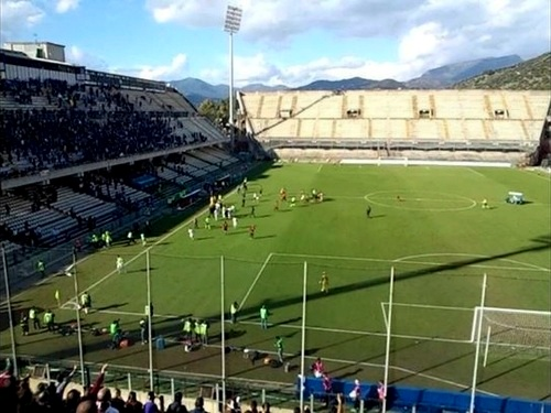 Partita di Lega Pro 2013-14 tra Salernitana e Nocerina poi sospesa. Immortalato un episodio inerente uno dei finti infortuni della Nocerina